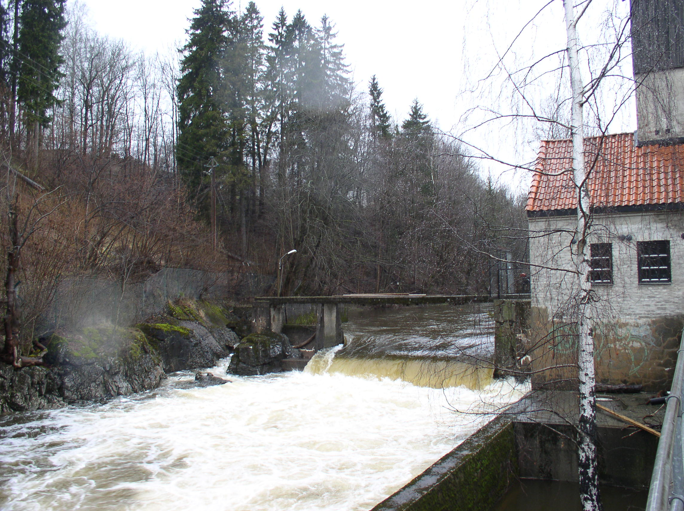 Franzefoss i Sandvikselva april 2007